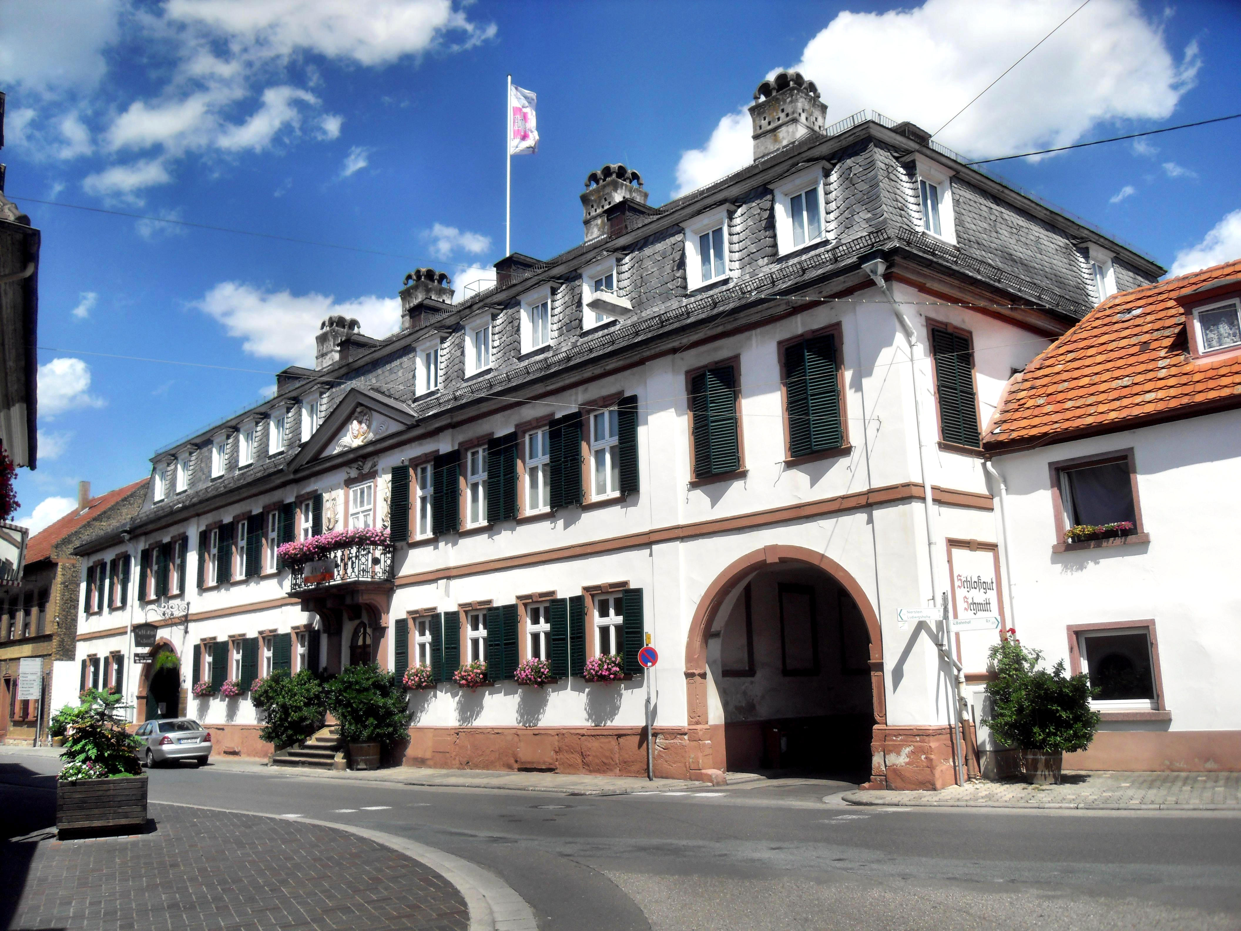 Das Guntersblumer ehemalige Neue Schloss (Schlossgut Schmitt) in Rheinhessen (Deutschland); Guntersblum, Hauptstraße 45/47. Mansardwalmdachbau, Mischform des Spätbarocks und Frühklassizismus, erbaut 1787–89